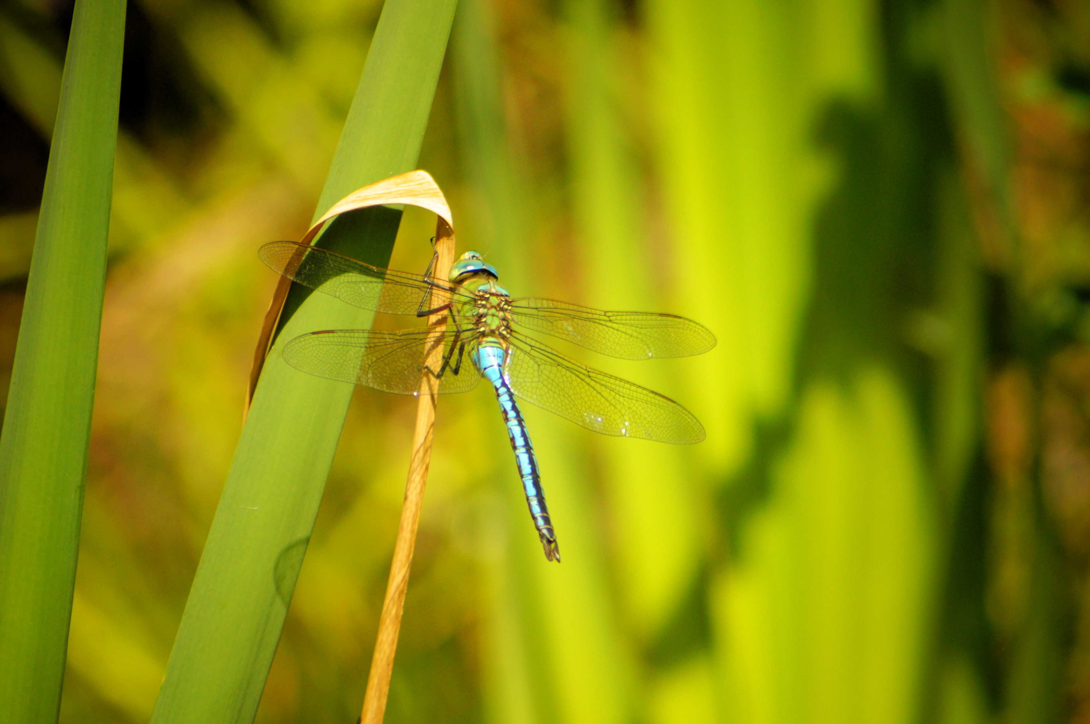 Burruntzi arra, Ulian